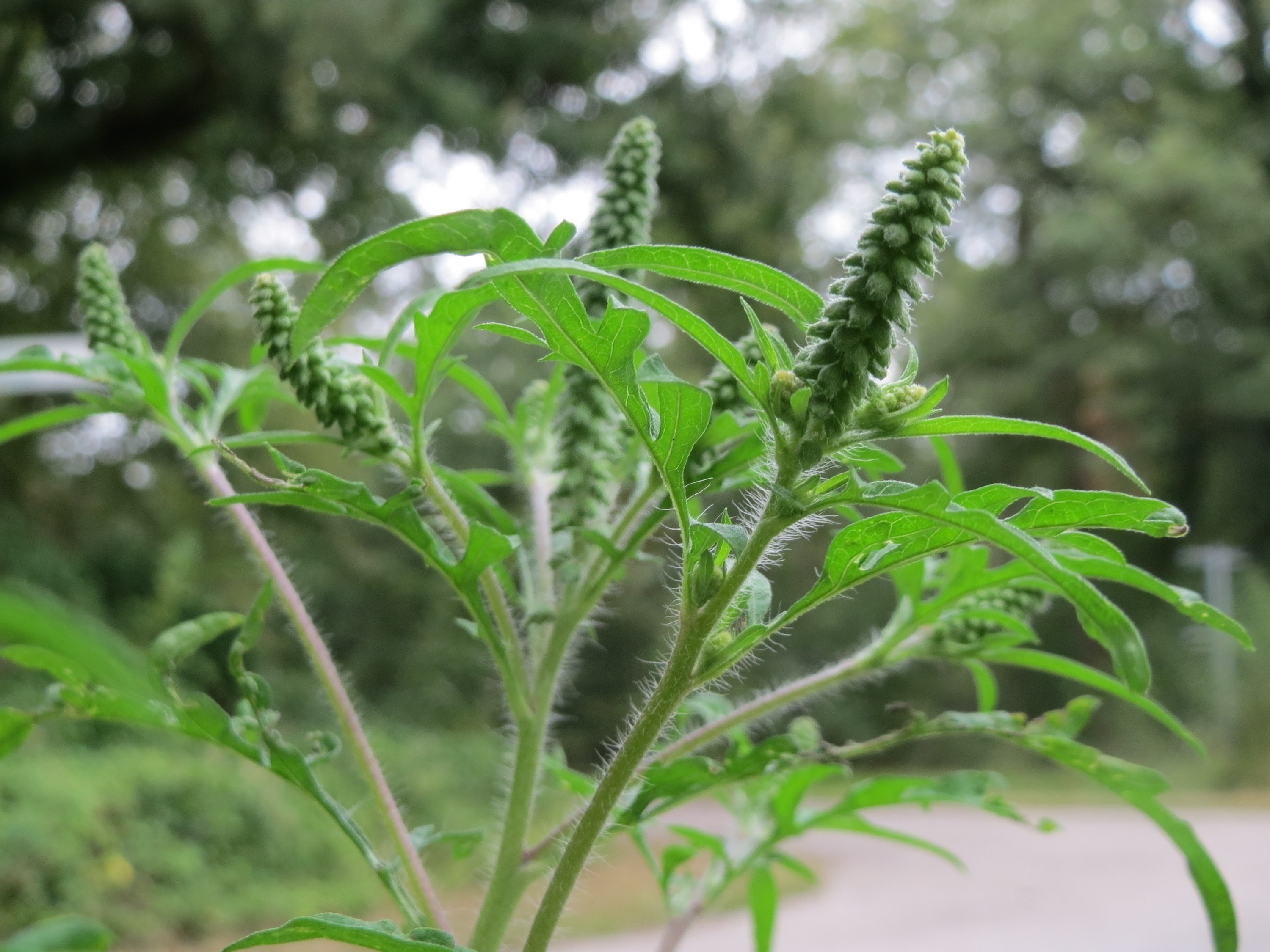 Beifußblättriges Traubenkraut (Ambrosia artemisiifolia) - invasiv im Schwetzinger Hardt